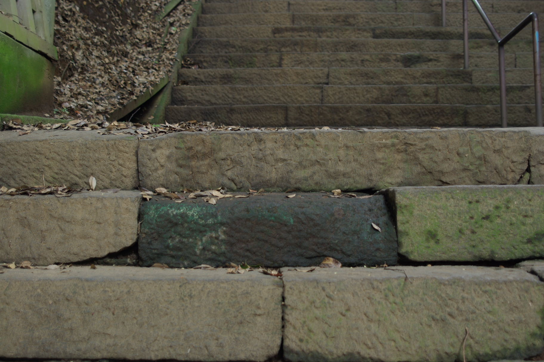 弘法寺の涙石